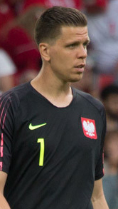 Польша неожиданно проиграла Сенегалу